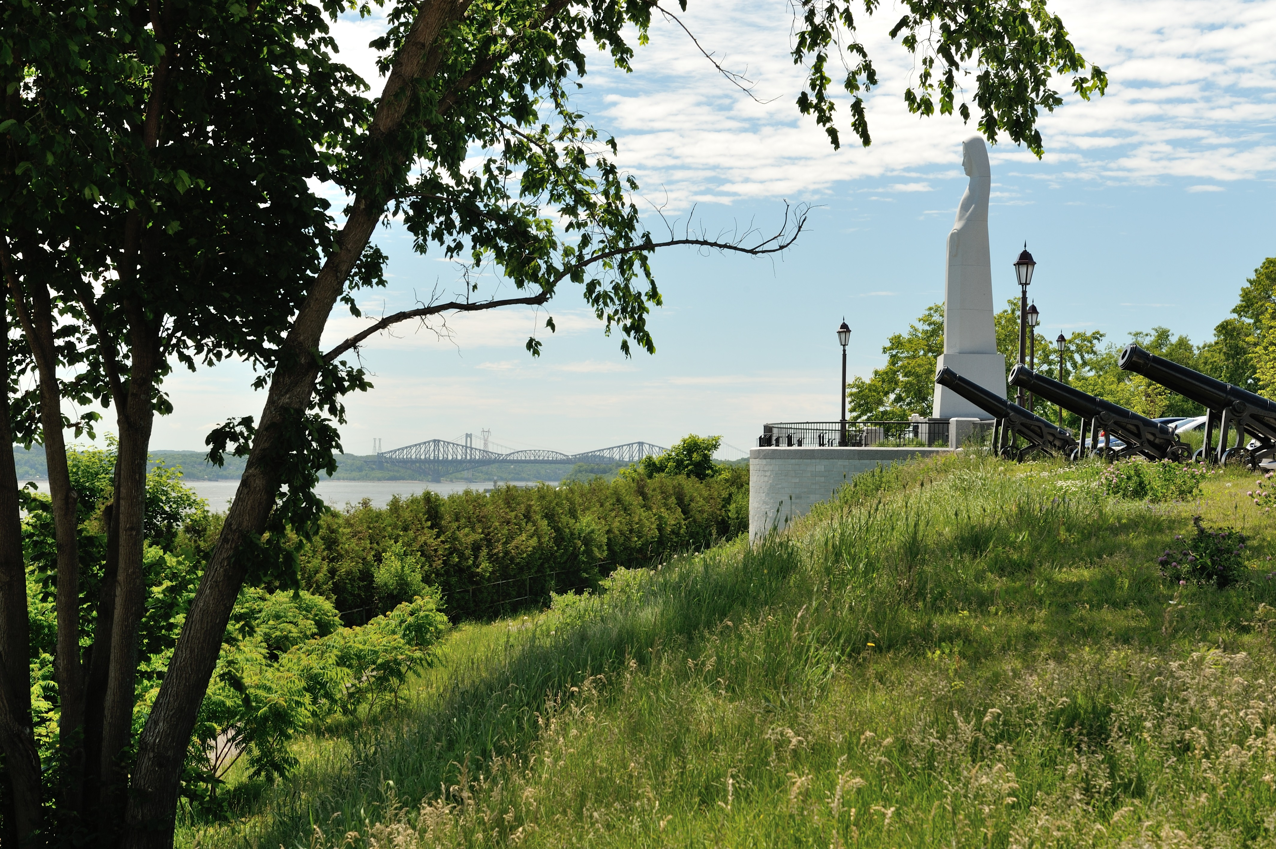 Au pied du parvis de l'Église Saint-Michel de Sillery se trouve la grande statue de Marie-Immaculée. Oeuvre de Luis Pagé, elle fut érigée en 1984, année de la visite du pape Jean-Paul II à Québec. Située au 1600 rue du Cardinal-Persico, au coeur de l'arrondissement Sillery de Québec, l'Église Saint-Michel et ses monuments font partie du patrimoine québécois.